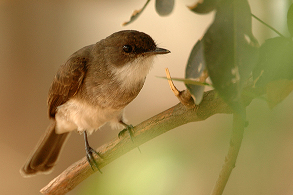 Uganda Swamp Alseonax (Muscicapa aquatica) Mbweya QE NP Dec 2005